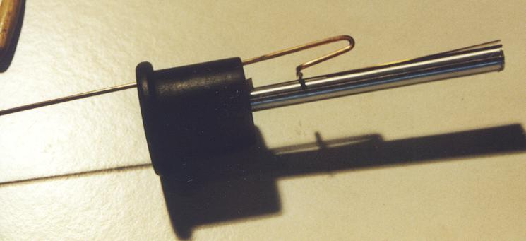 Stimmkrücke, Nuss, Zunge und Kehle einer Dulzian 16'-Pfeife der Mertin-Zika-Orgel der Pfarrkirche Alt-Ottakring